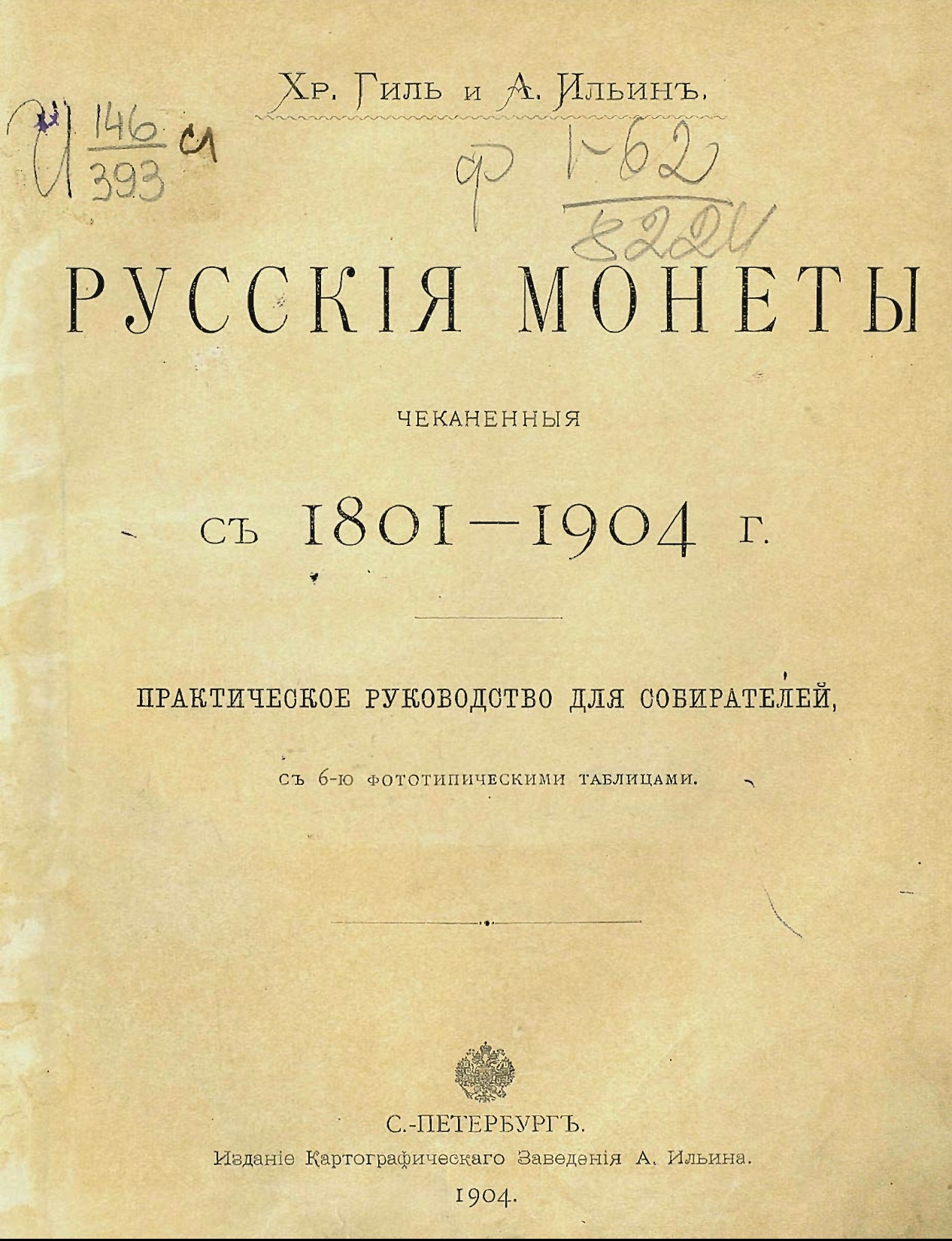 Х.Х.Гиль обложка книги